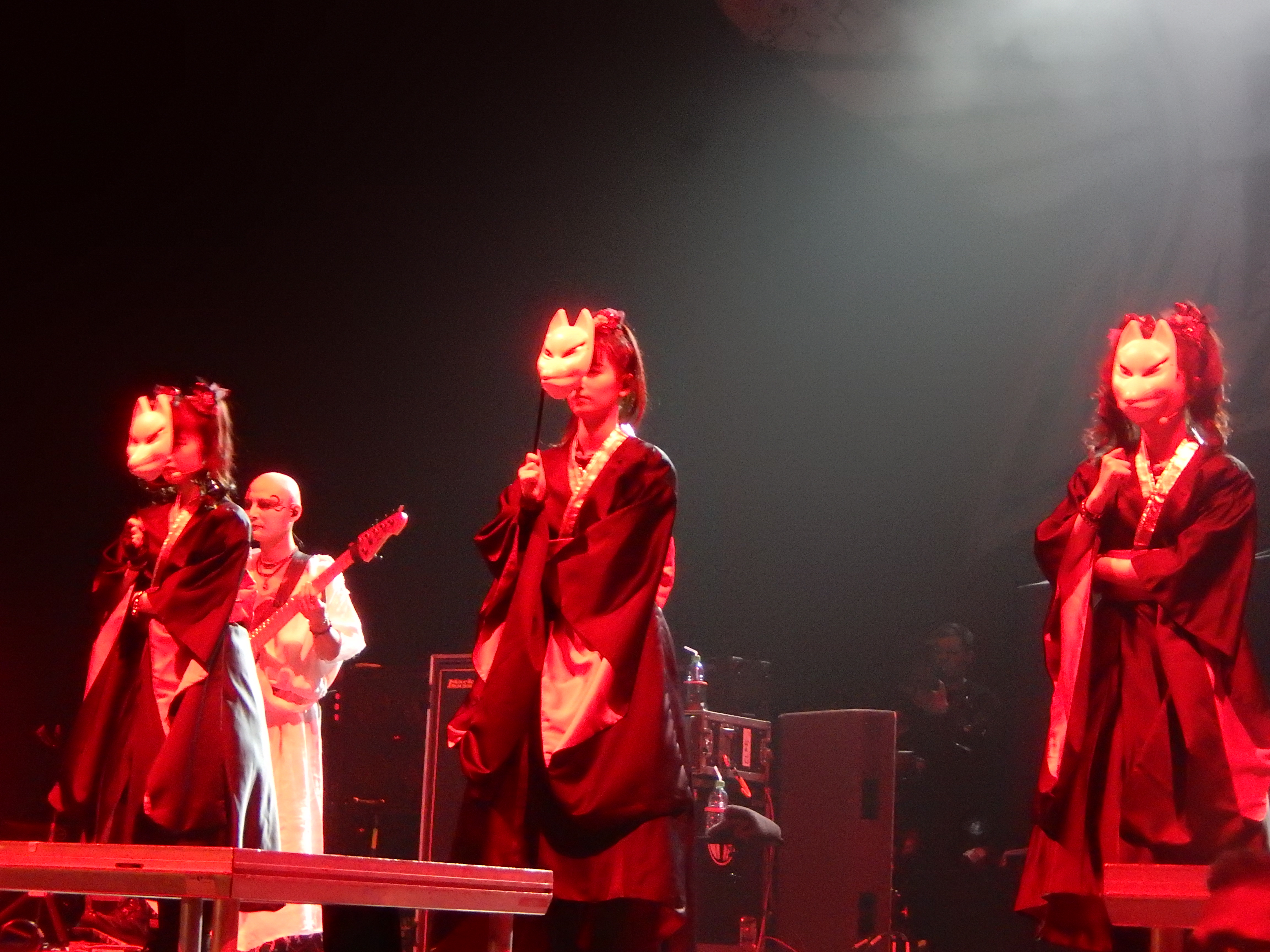 BABYMETAL, O2 Arena, London